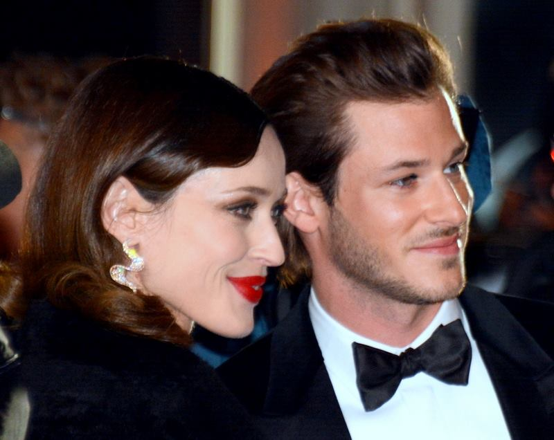 Gaspard Ulliel et Gaelle Pietri à la cérémonie des César